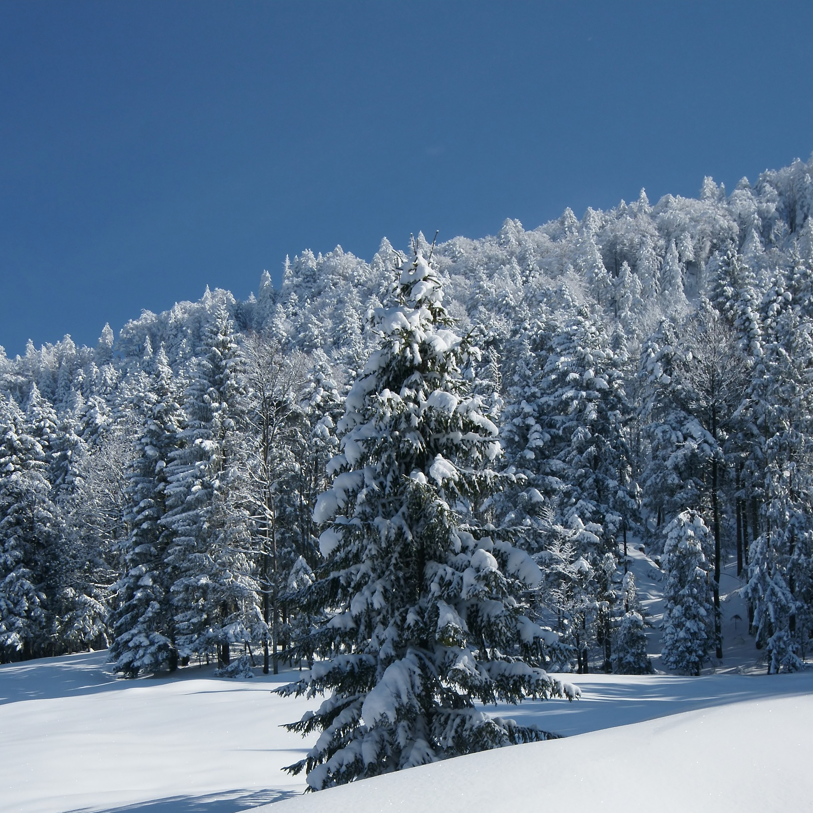 Die Gemeine Fichte (Picea abies) ist eine Pflanzenart in der Gattung der Fichten (Picea). Sie ist in Europa heimisch und der einzige in Mitteleuropa natürlich vorkommende Vertreter der Gattung. Fichtenwald am Brüggelekopf in Alberschwende.